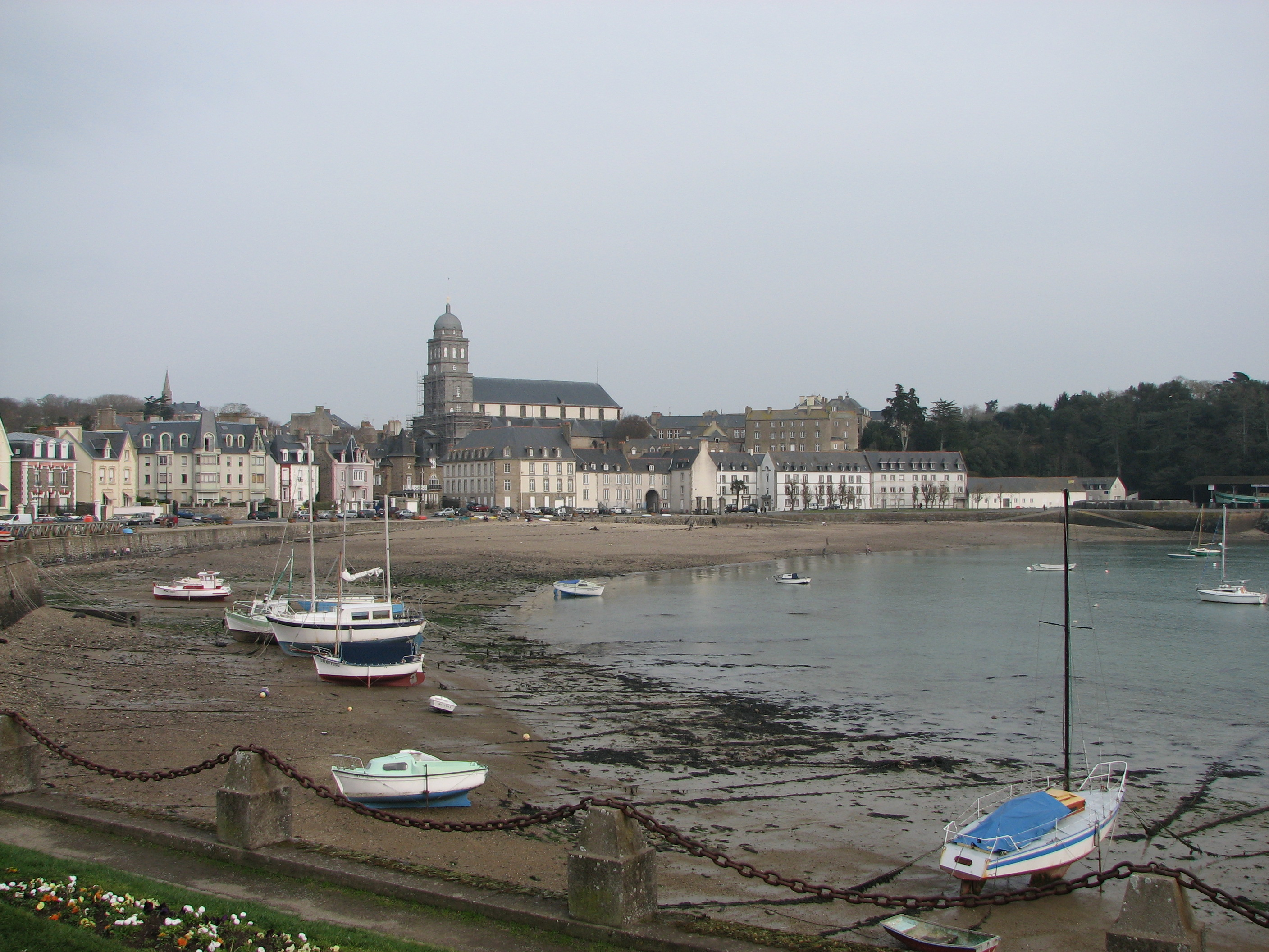 Vue de l'ancien arsenal à Saint-Servan (Saint-Malo) depuis le pied de la tour Solidor